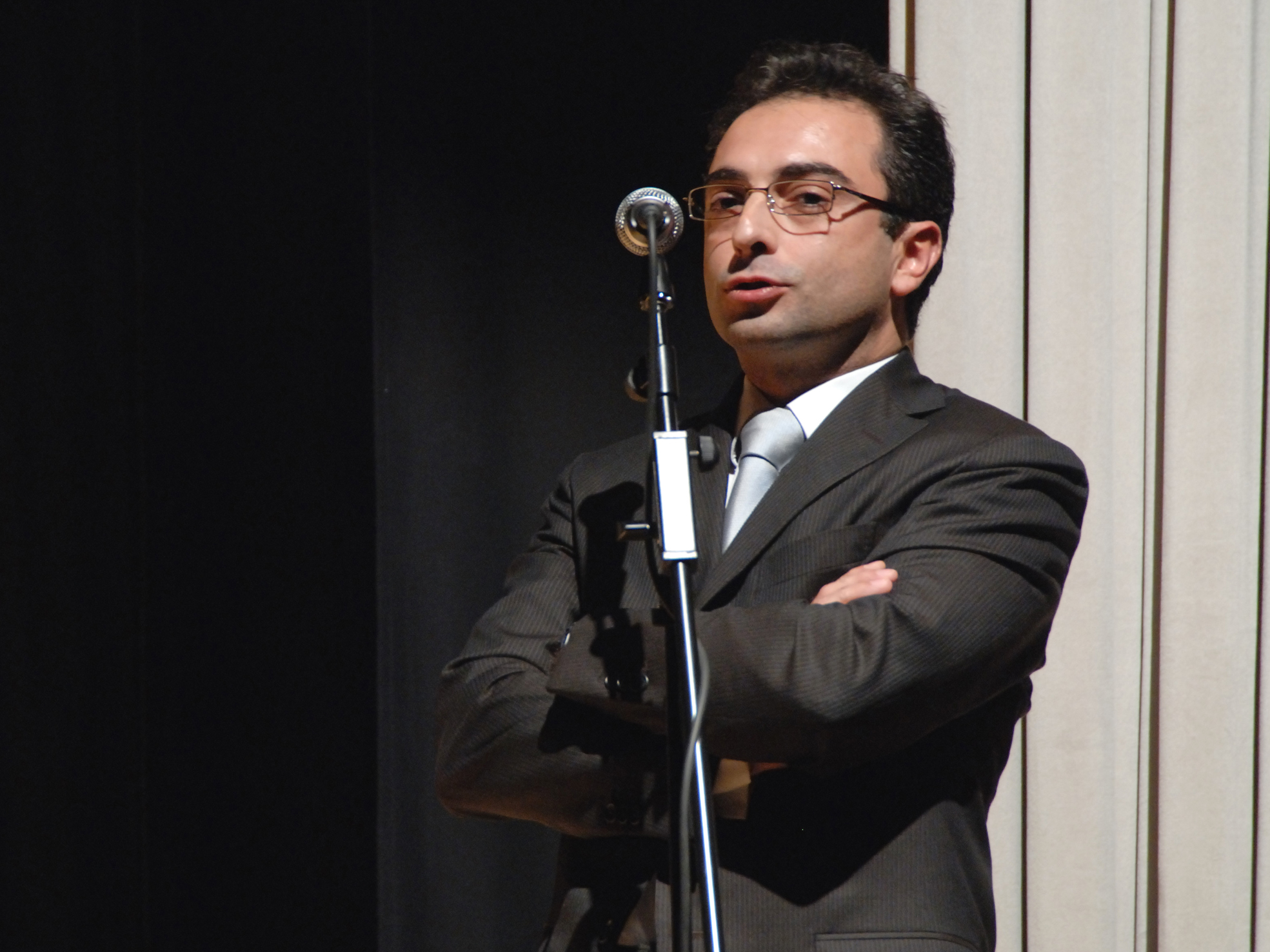 profesor de Composición y Análisis en el Conservatorio Superior de Música de las Islas Baleares, colaborador del Festival Internacional de Santander y ganador de diferentes premios